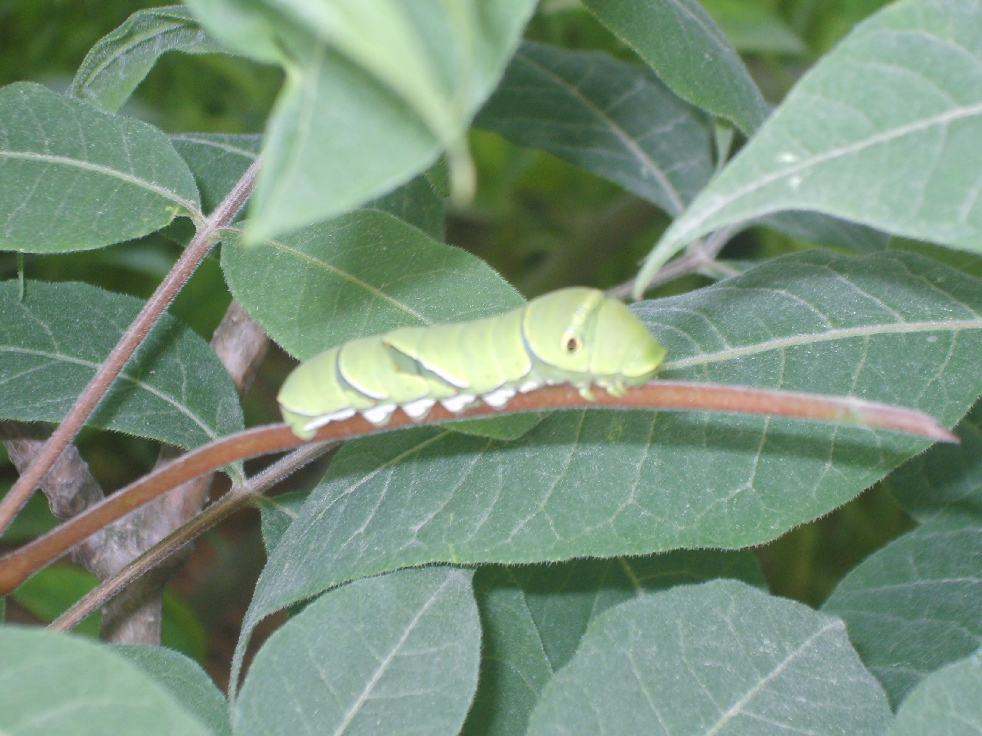 Papilio xuthus's larva on Phellodendron amurense in Hampyung Korea. 황벽나무에 살고 있는 호랑나비 애벌레. 함평 나비축제 국제나비관에서 찍음.